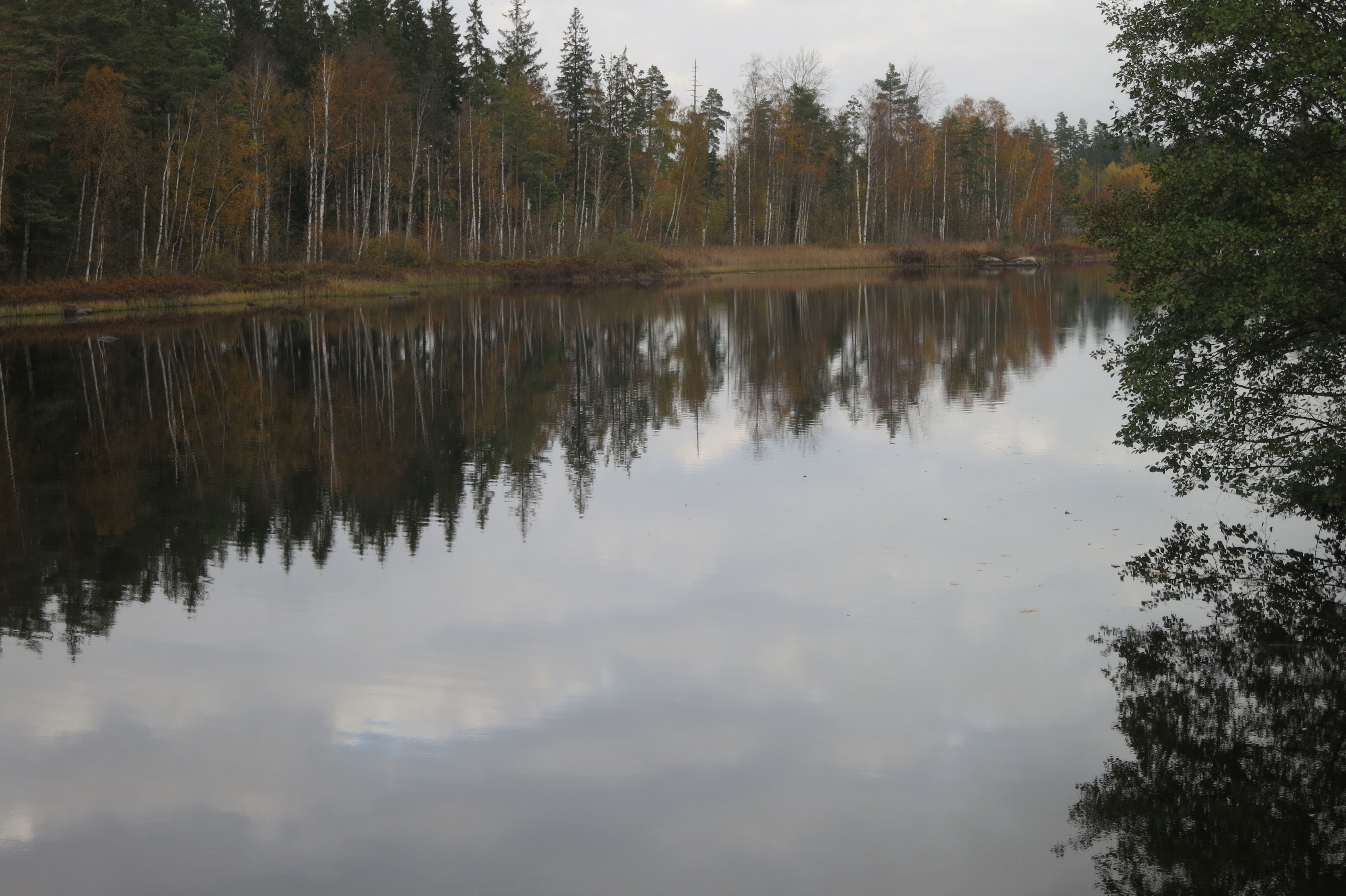 Sjön Krokfjorden, Tingsryds kommun